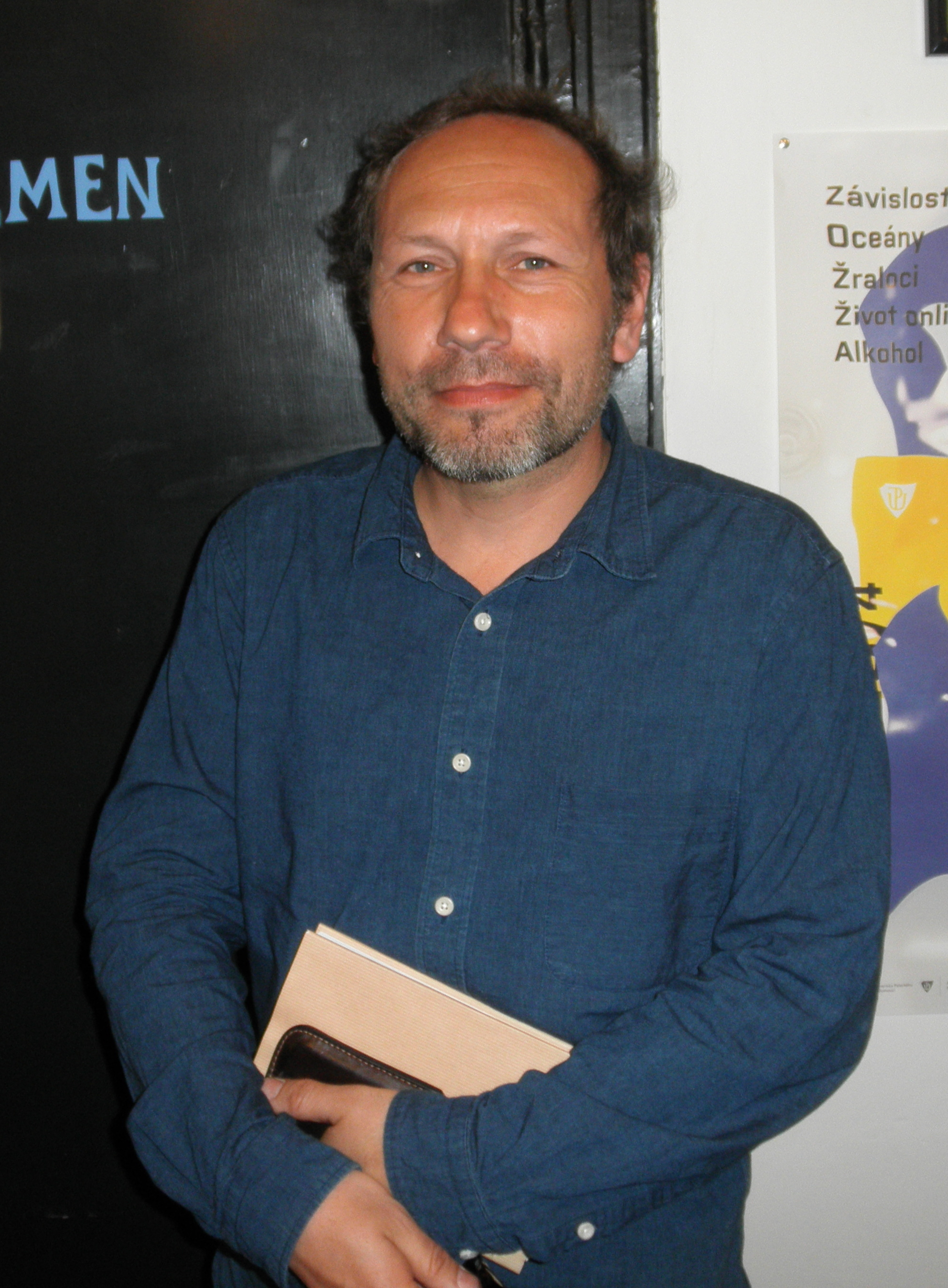 Český paleoekolog Petr Pokorný.